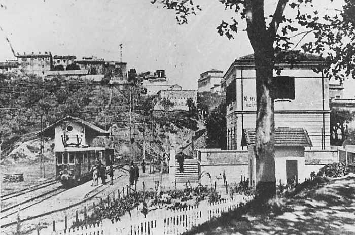 La stazione ferroviari di Monte Porzio sulla diramazione San Cesareo-Frascati.